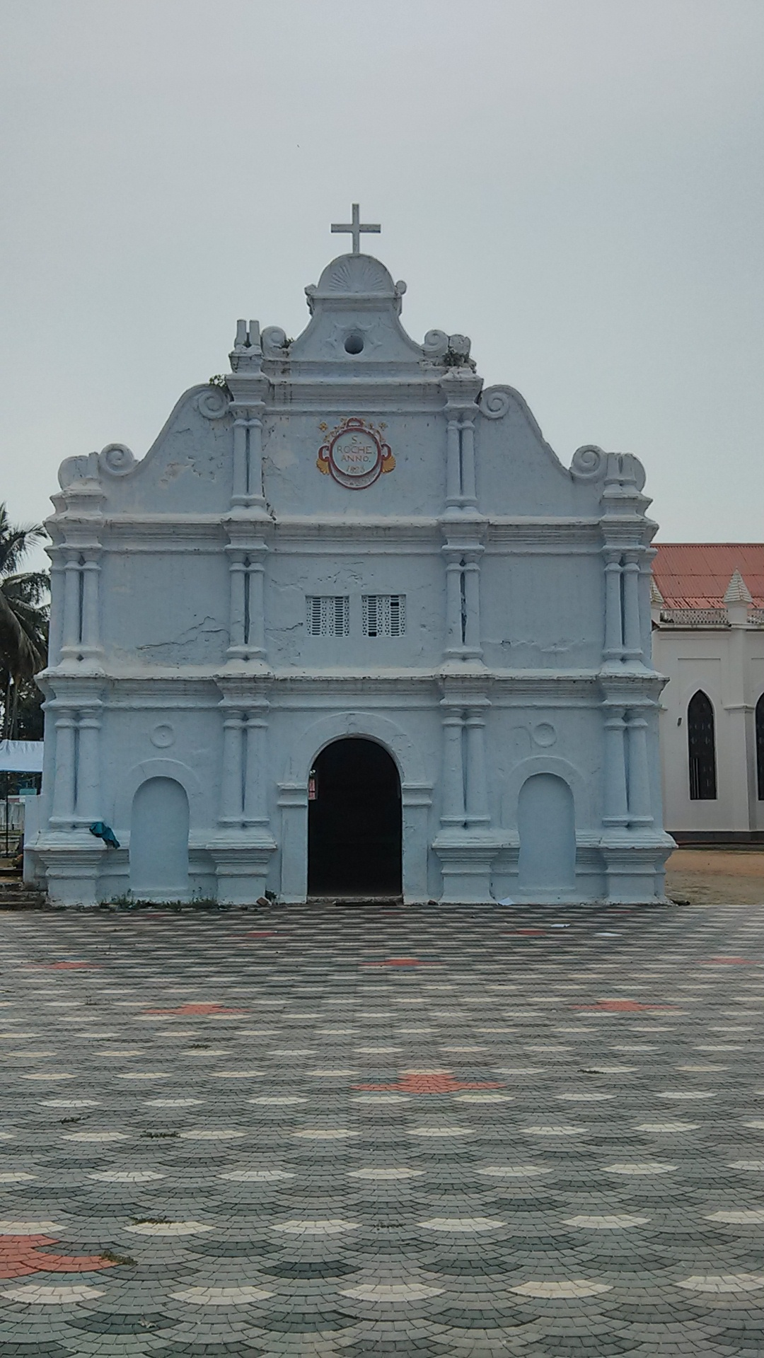 Manjumatha Our Lady of Snow Basilica at Pallipuram,Munambam,Vypin